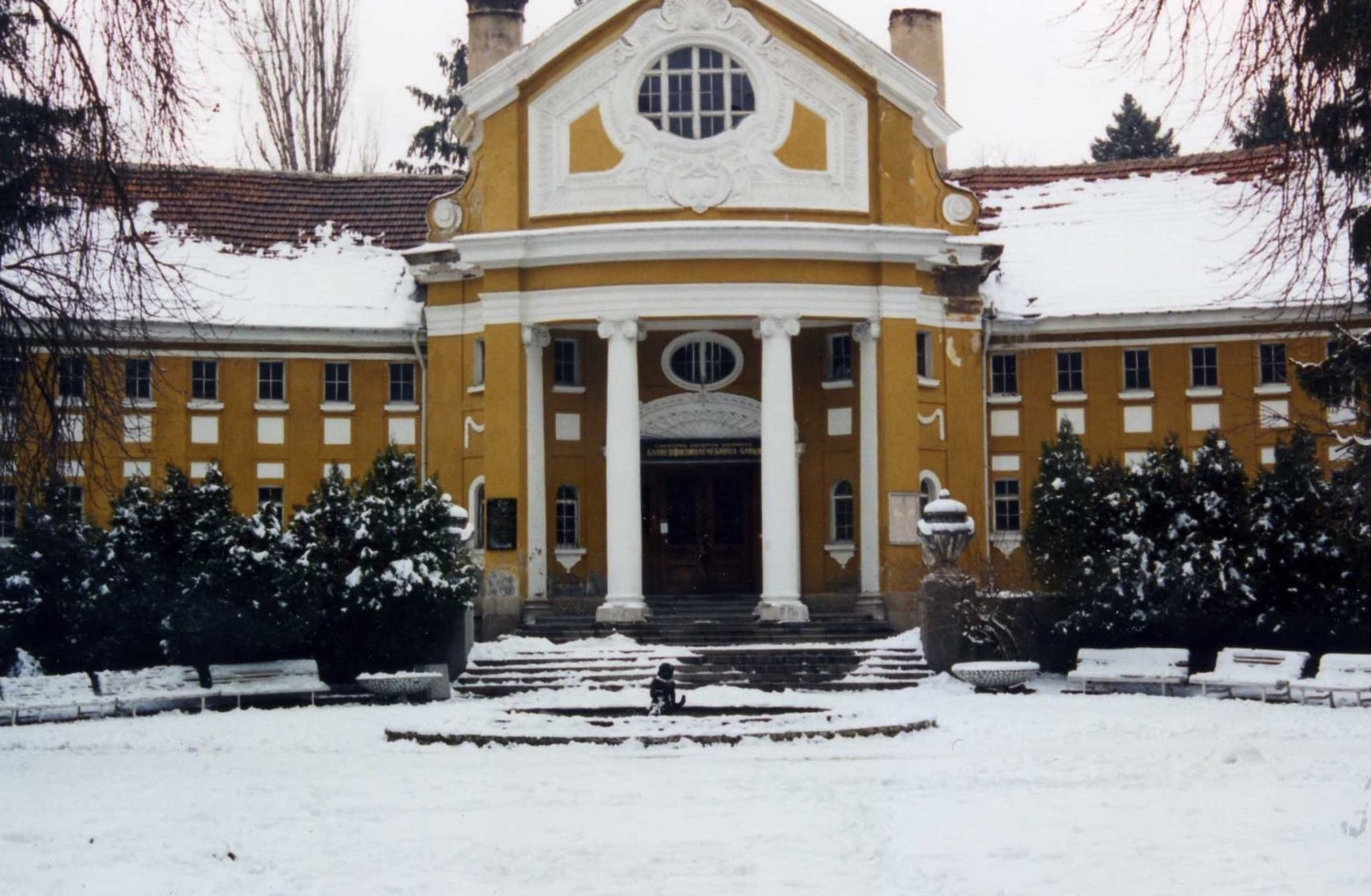 The Mineral Baths in Bankya, Bulgaria, Jan 1995